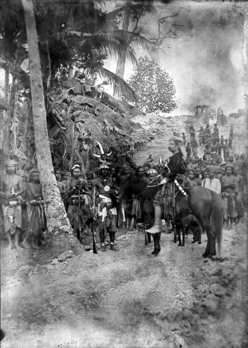 Negatief. De Radja van Amarasi te paard, Timor